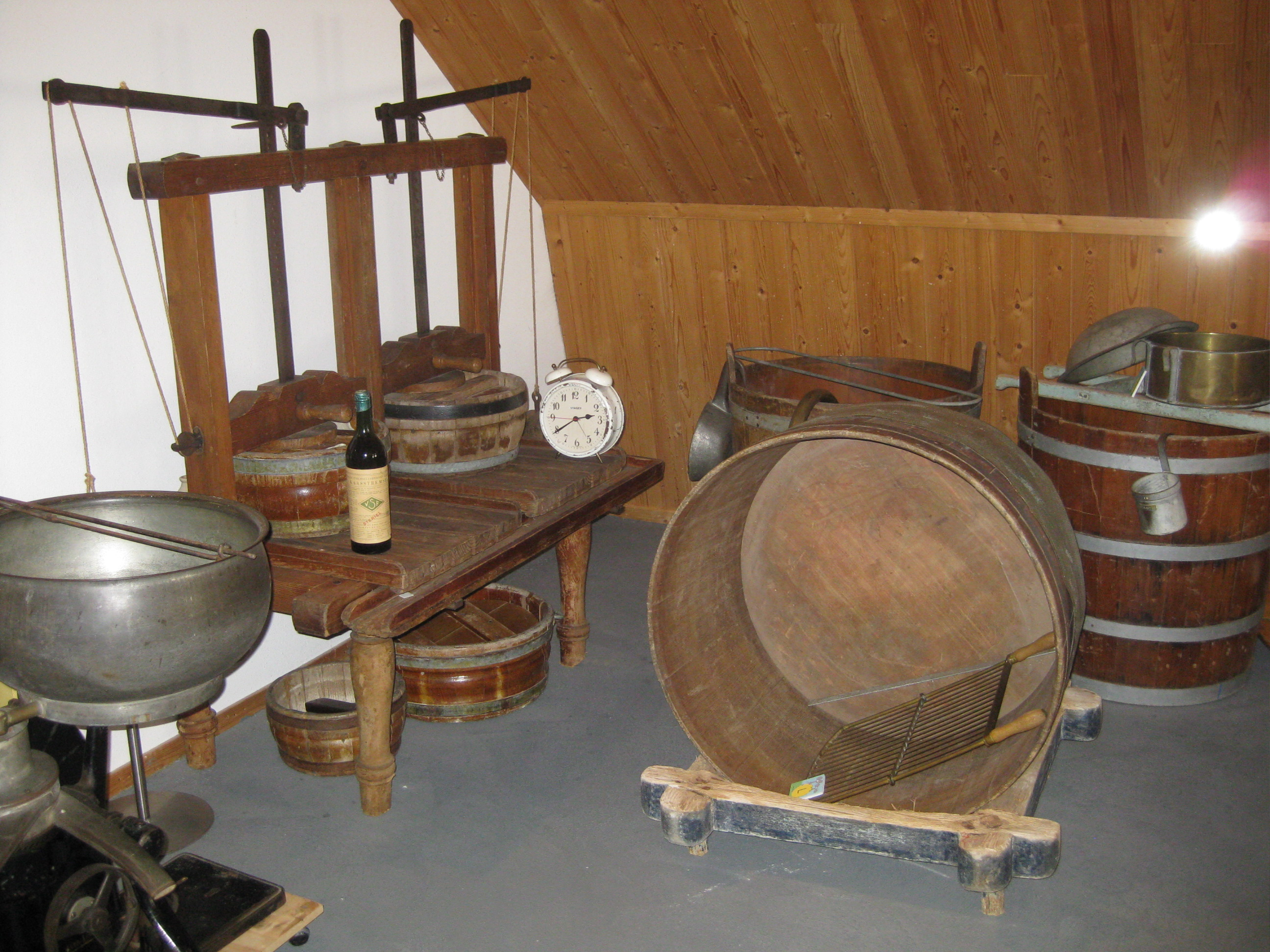 Gereedschapppen, Kaasbereiding